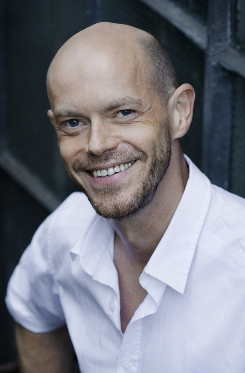 Portrait des Schauspielers Christian Baumann